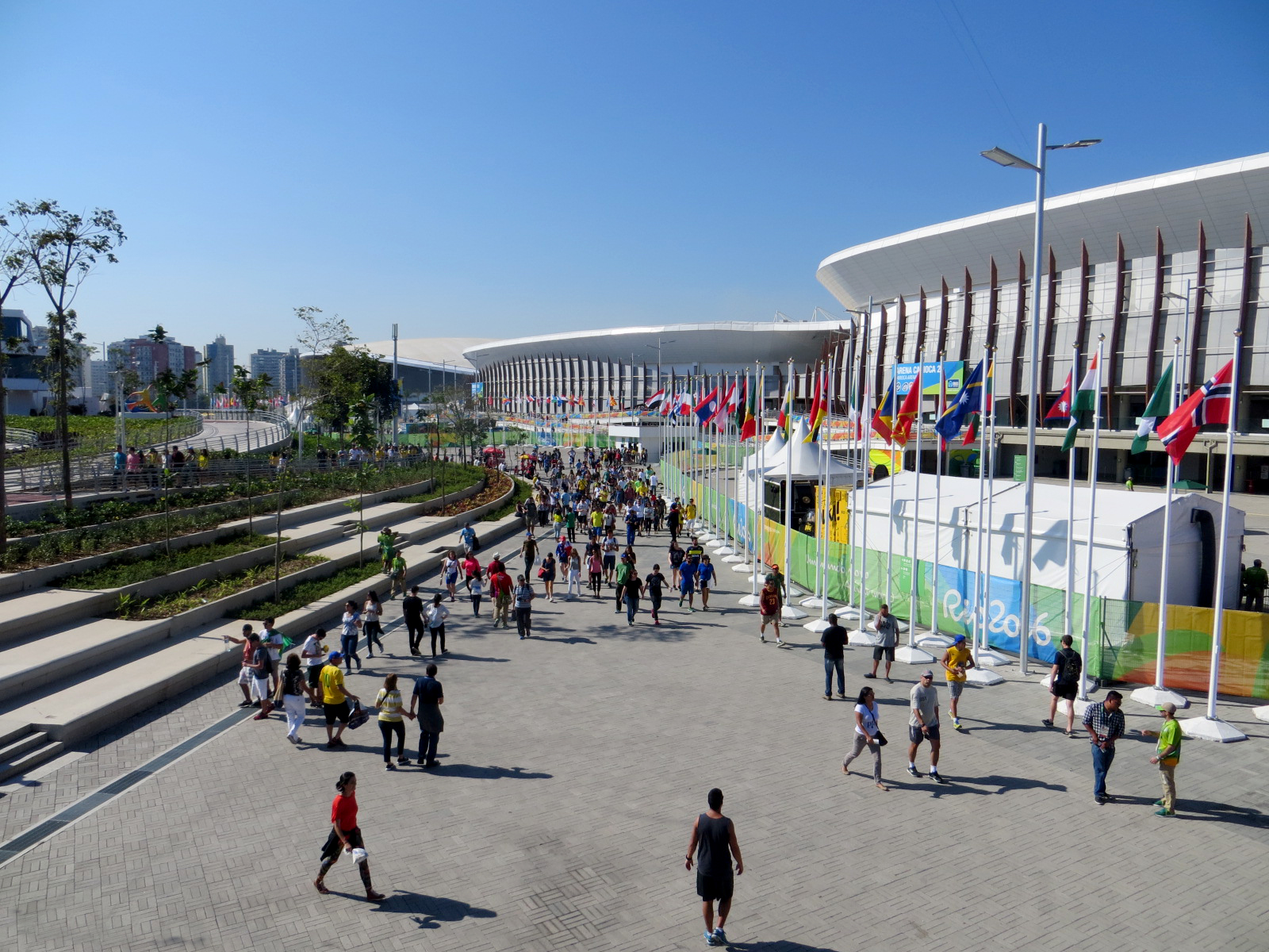 Rio de Janeiro Olympic Park